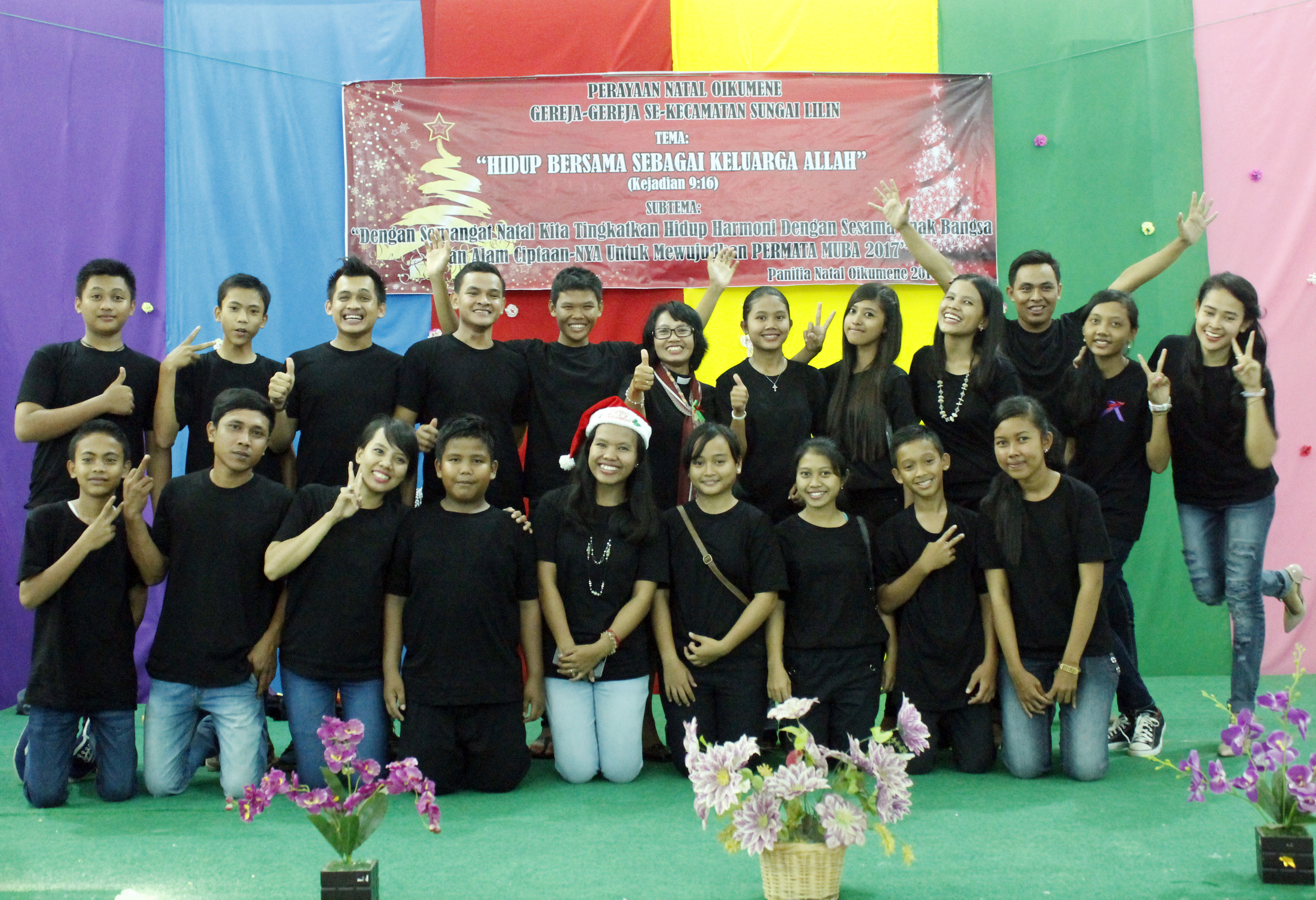 Pemuda-pemudi GKSBS Sungai Lilin, Kab. Musi Banyuasin-Sumatera Selatan, dalam acara Perayaan Natal Oikouemene 2016